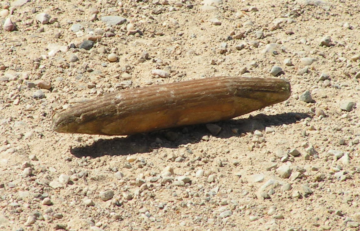 Bèlit